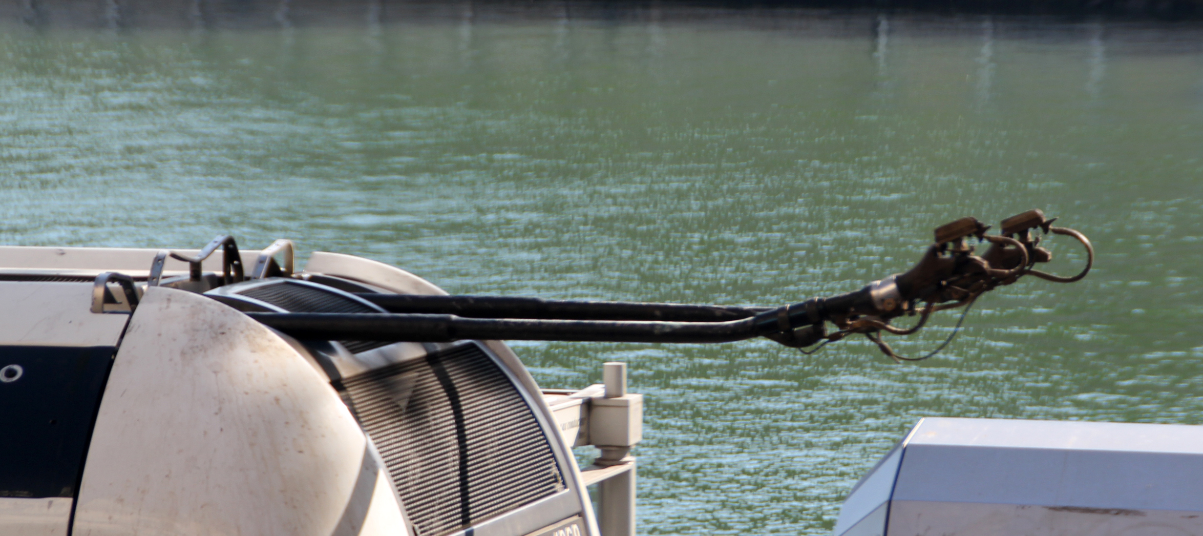 Irisbus Cristalis ETB12 des Transports en Commun de Lyon : détail des perches.